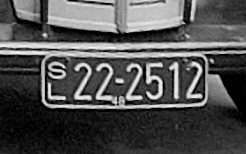 Kfz-Kennzeichen in der SBZ (Leipzig) 1951 Original image description from the Deutsche FotothekAnsicht eines parkenden IFA Framo Lebensmitteltransporters am Neumarkt